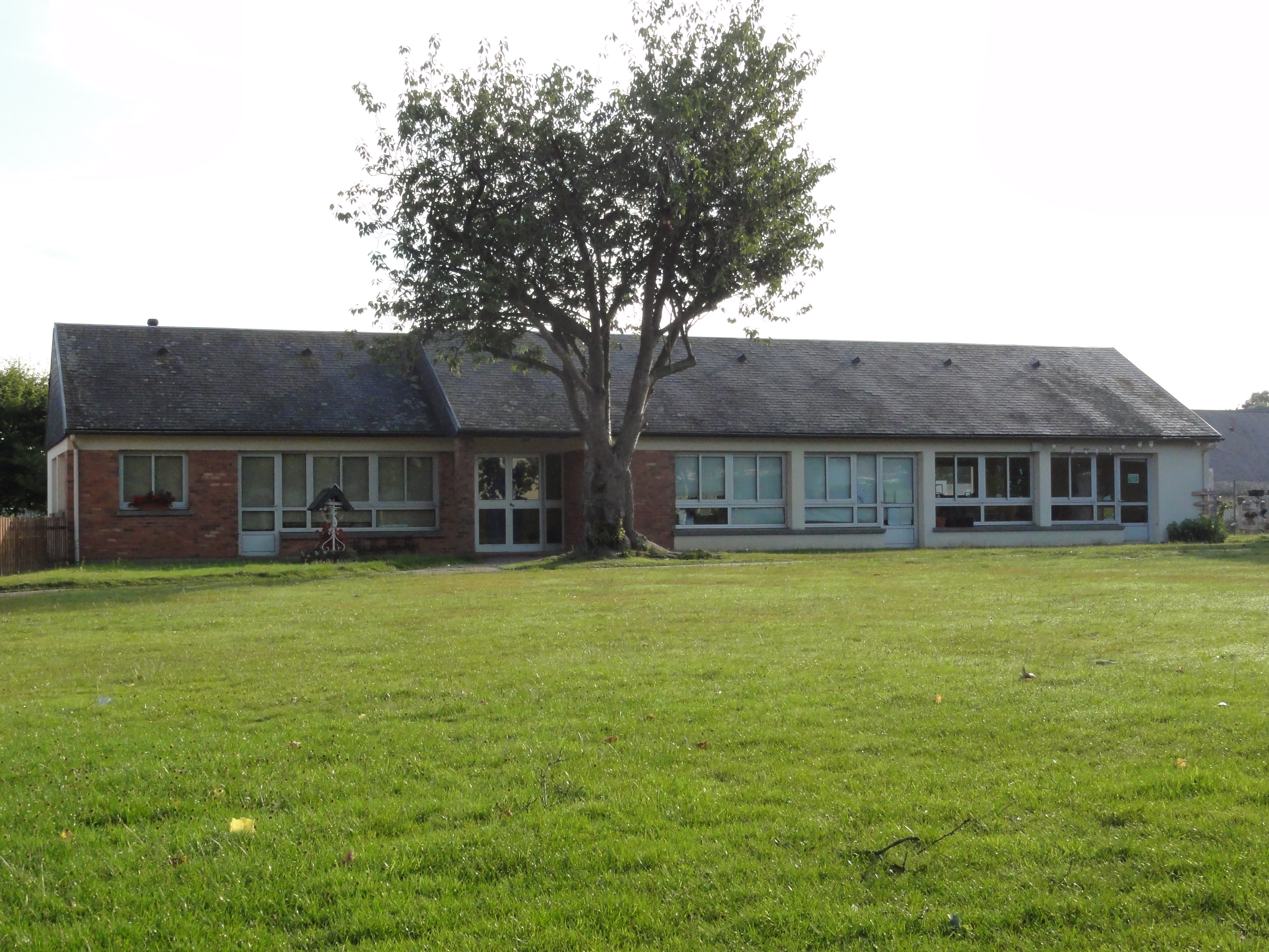 Normanville (Seine-Mar.) école